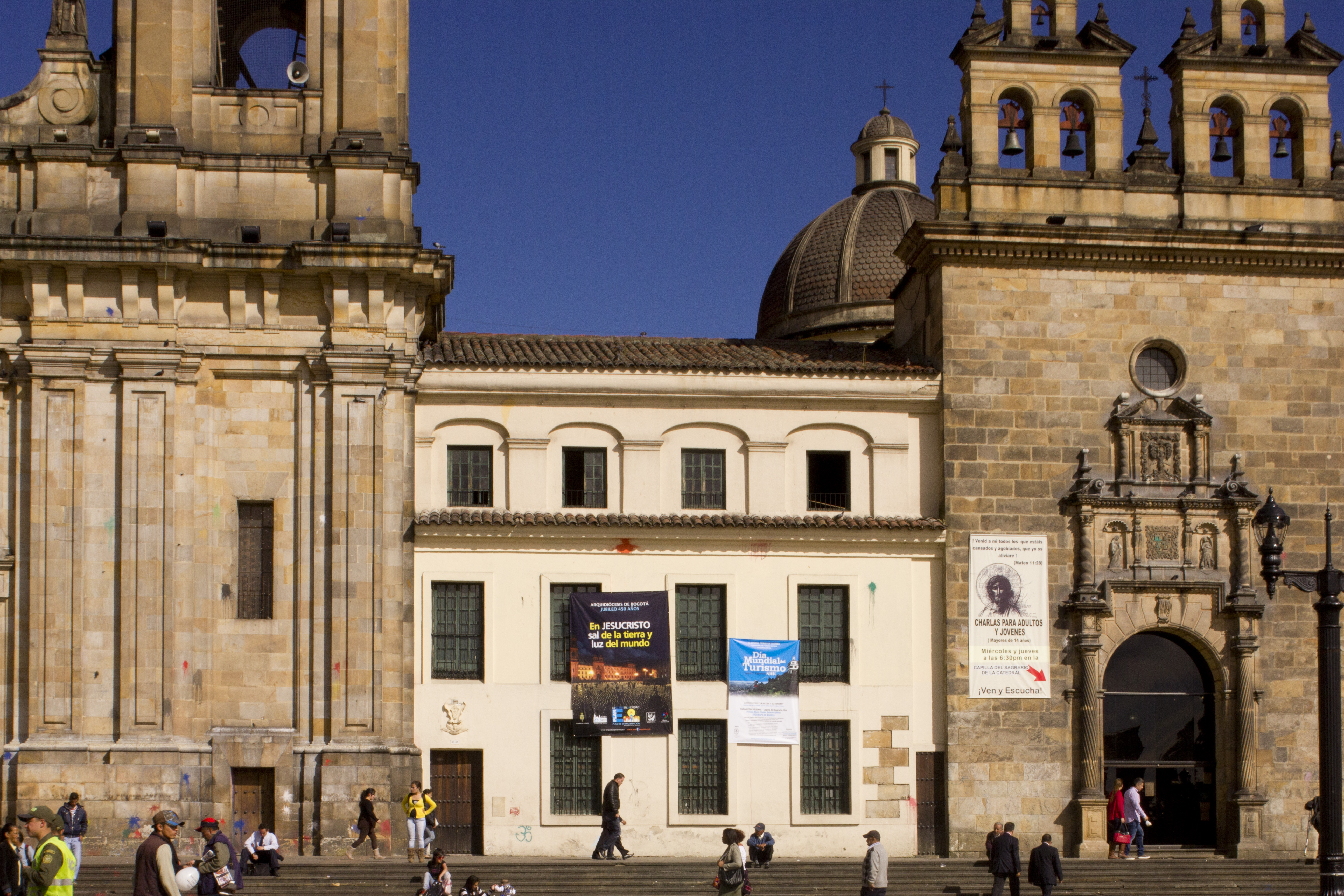 es una pequeña casa que se encuentra en la plaza de Bolívar , en mitad de la Catedral Primada y la Capilla del Sagrario